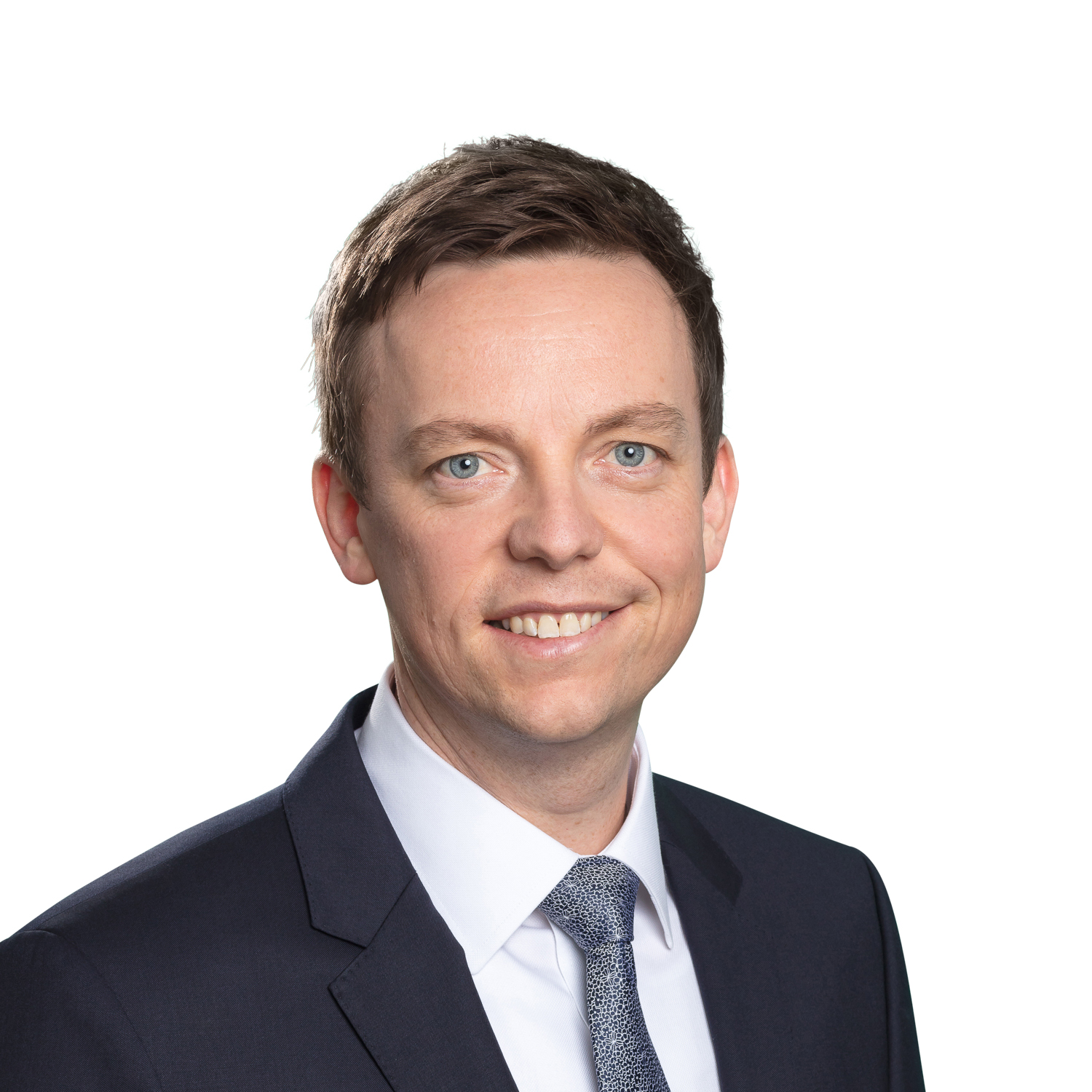 Ministerpräsident des Saarlandes, Tobias Hans